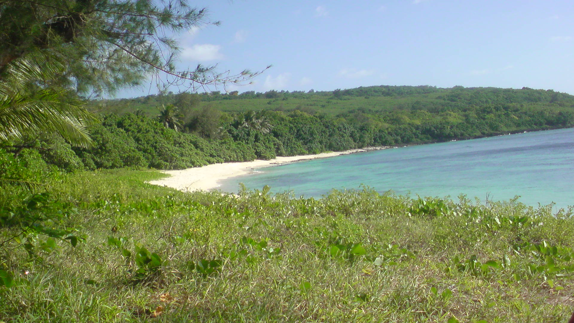 タチョンガビーチ